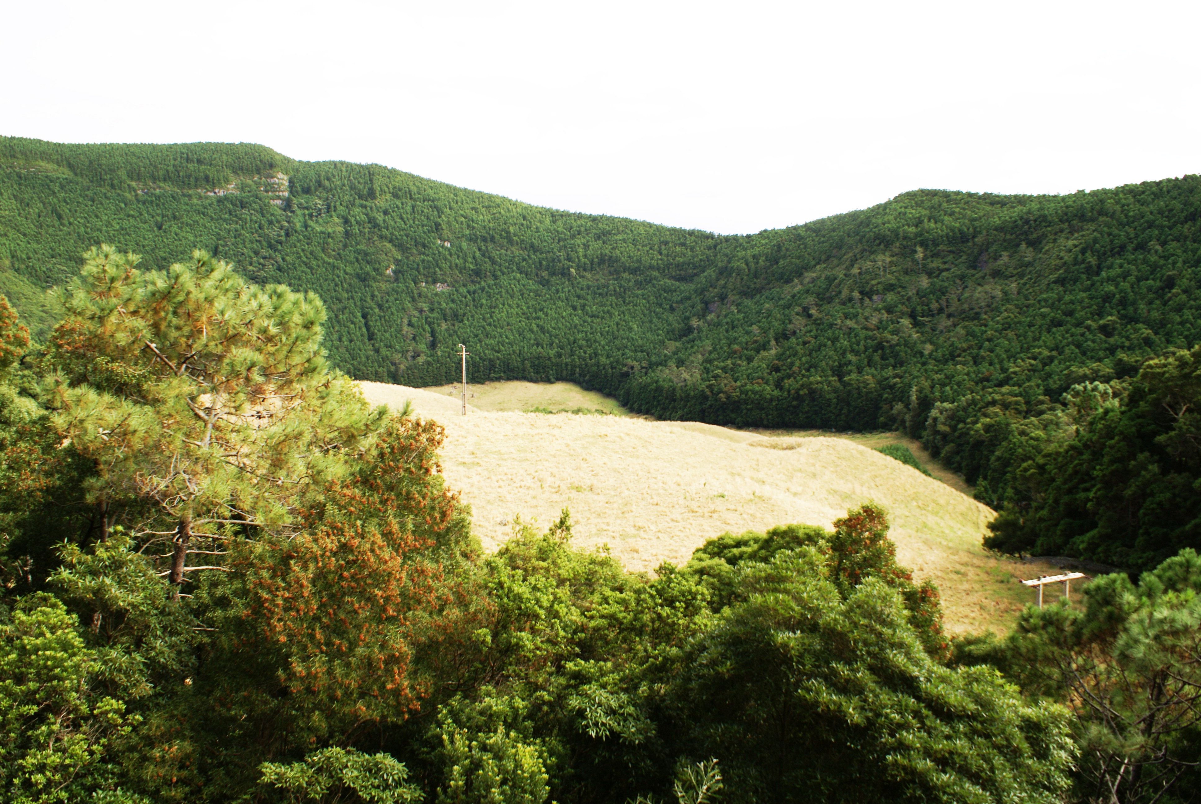 Caldeira da Graciosa, vista do Miradouro 2, Santa Cruz da Graciosa, Açores, Portugal